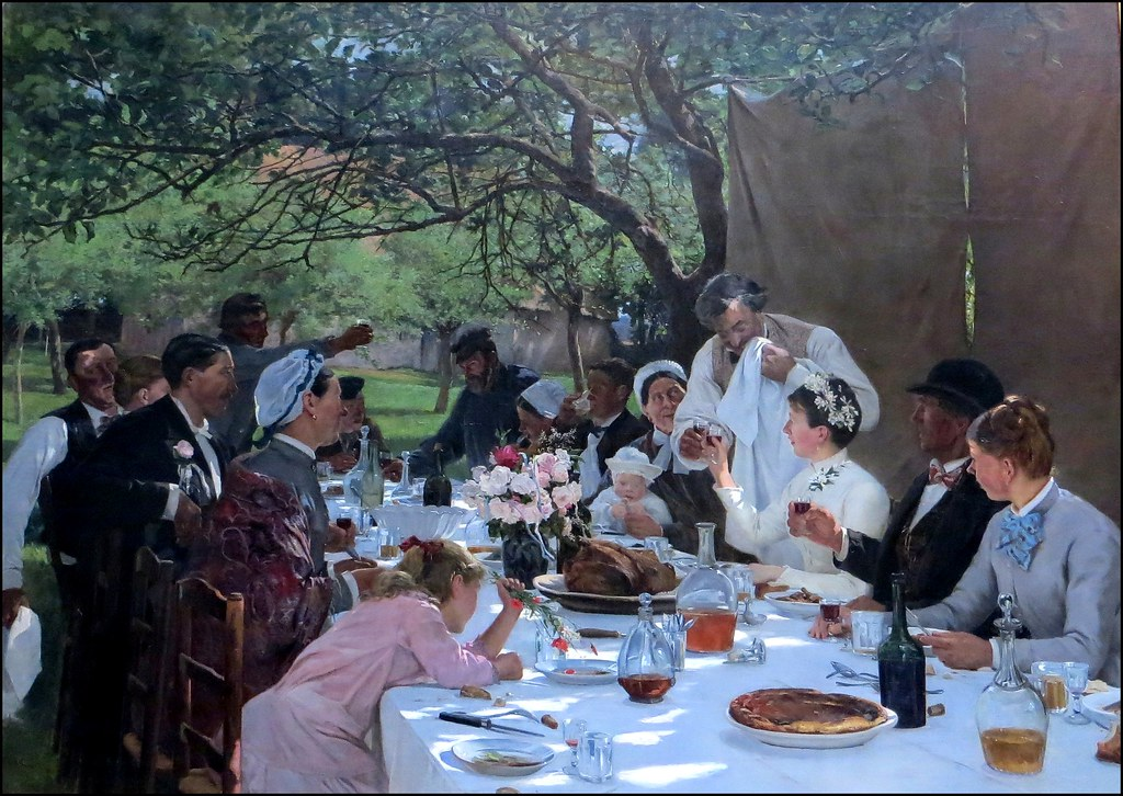 Un Repas de Noces à Yport